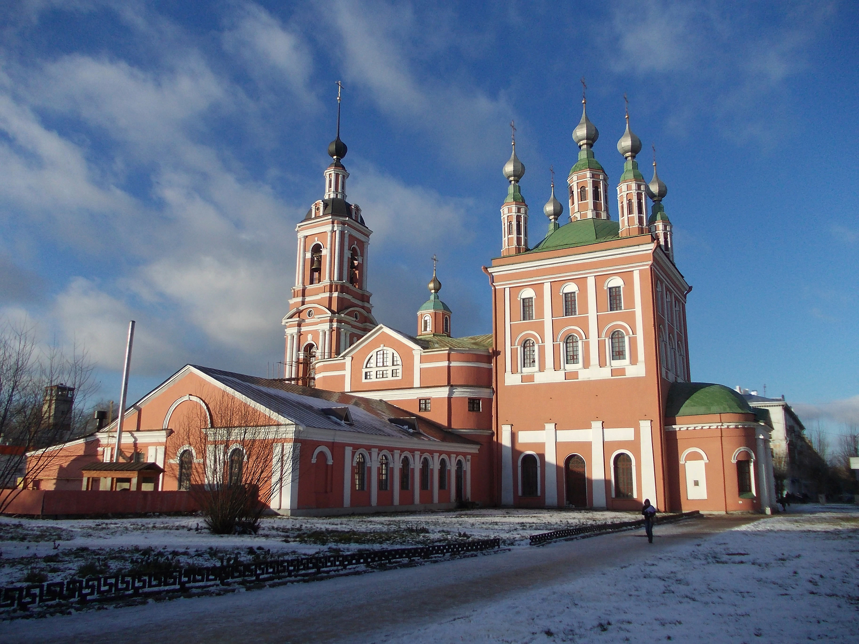 Николо-Ямской храм в Рязани.